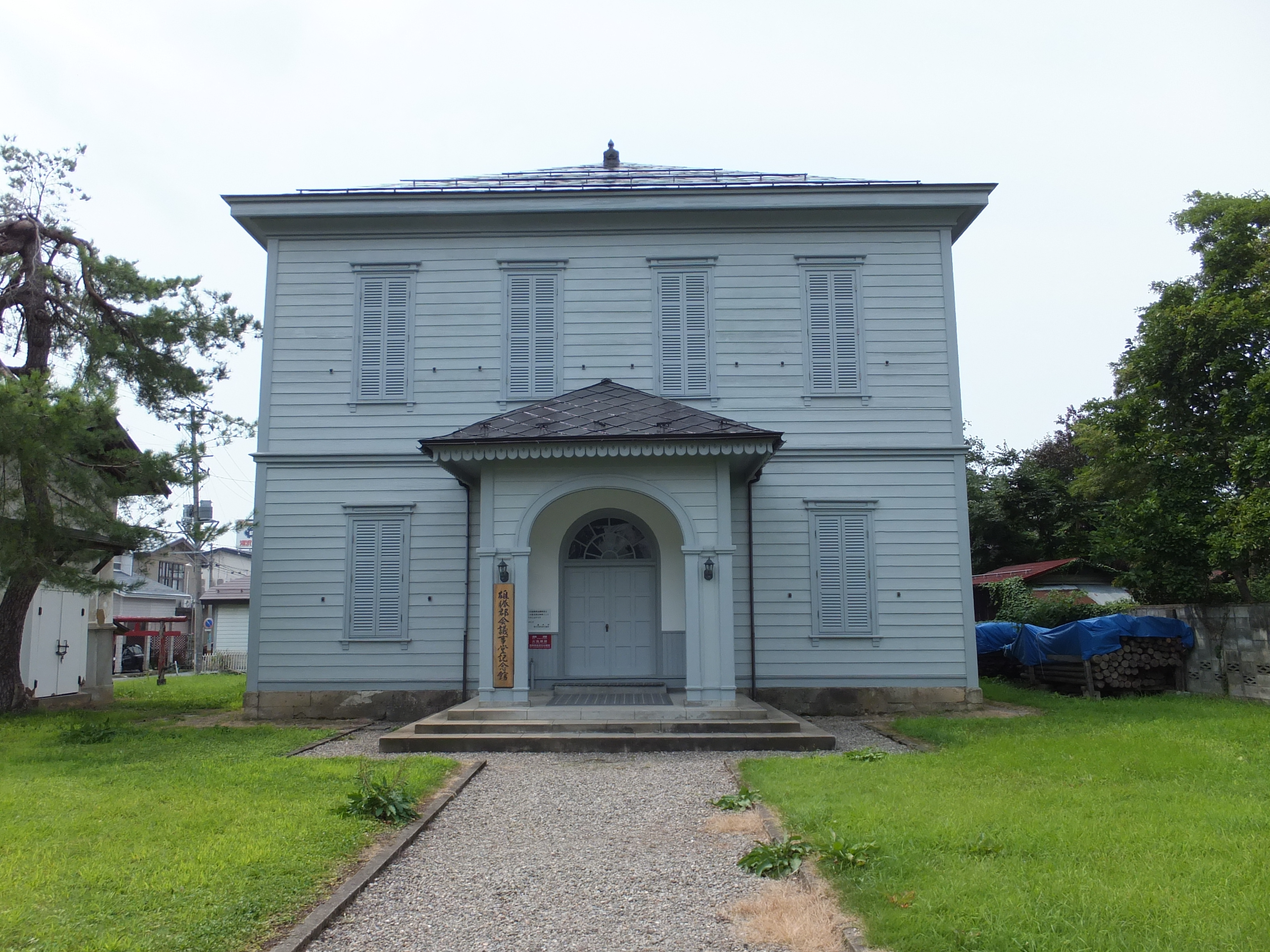 雄勝郡会議事堂記念館。雄勝郡会の議事堂として使用されたのち、湯沢町公会堂→雄勝地方事務所→湯沢町役場→市役所→図書館の経歴を経て、昭和50年に秋田県指定文化財に指定された。